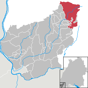 Todtnau, Landkreis Lörrach, Baden-Württemberg